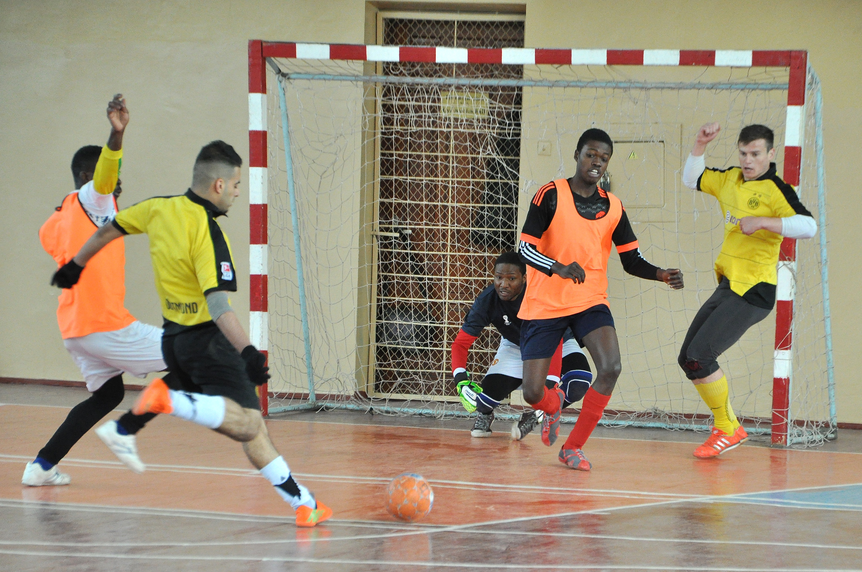 Міні-футбол «Ліга чемпіонів» Тернопільського державного медичного університету імені І. Я. Горбачевського. Півфінальні та фінальний поєдинки 26 квітня 2016 року. Поєдинок між командами Гани та Іраку.